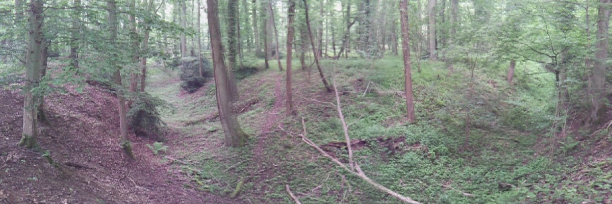 Vue panoramique prise au coin nord des douves